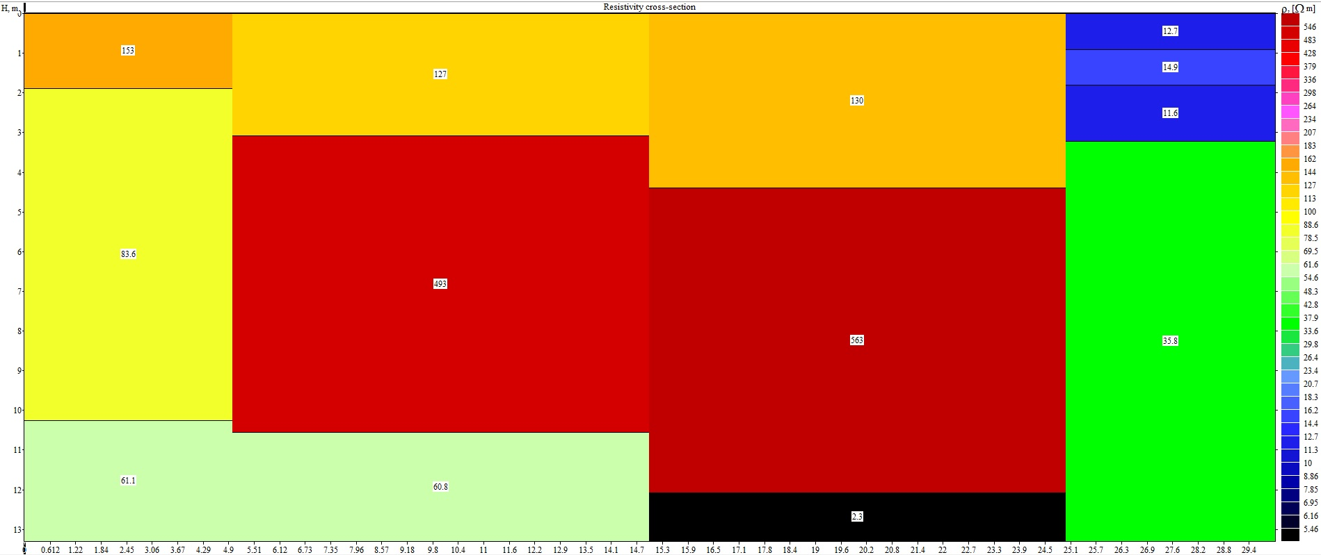 Автор программы: А.Бобачёв (МГУ)